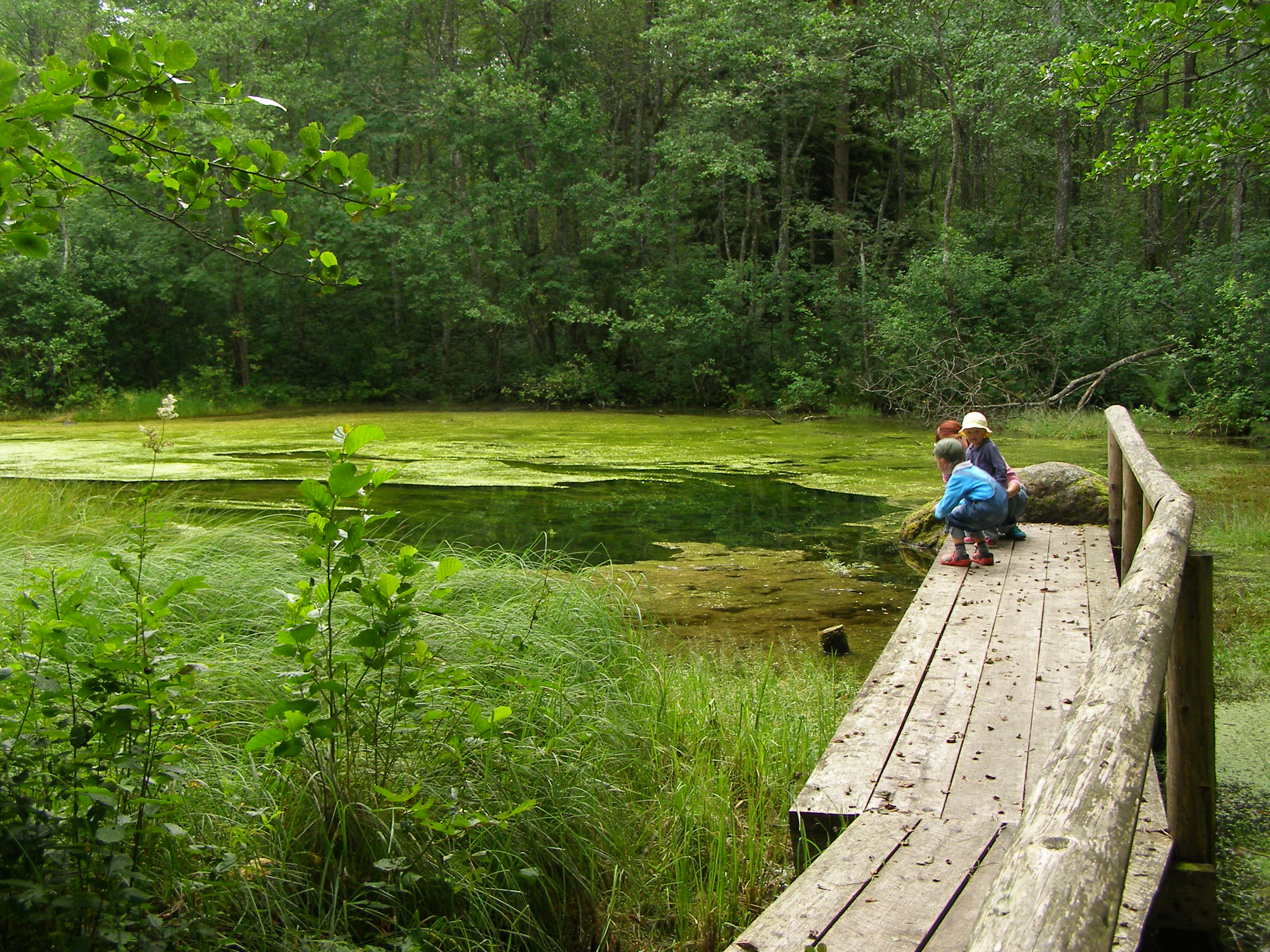 Suurallikas Vormsi saarel